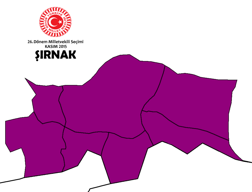 Kasım 2015 Seçimleri